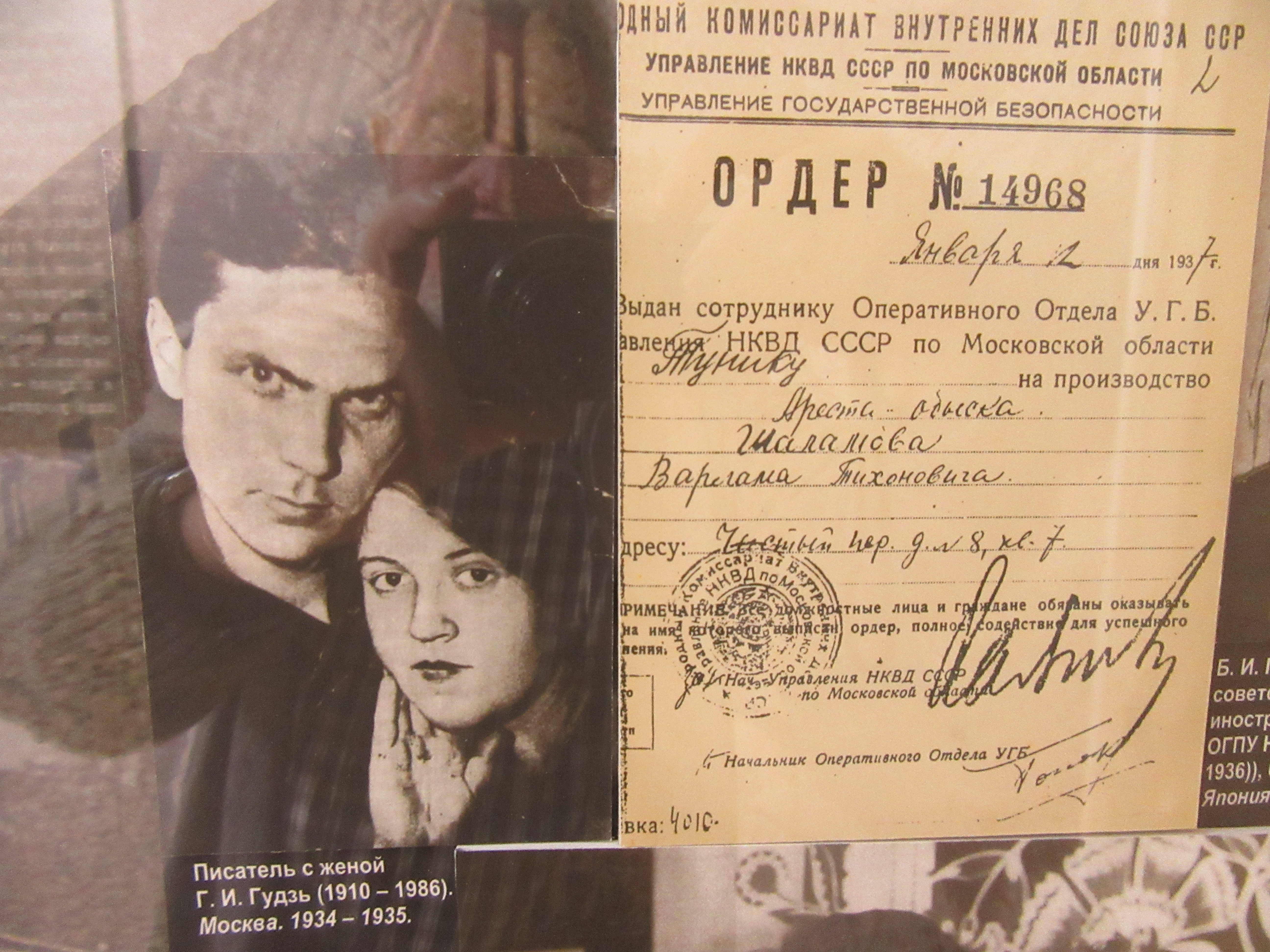 Photo sur un document des époux Chalamov V.